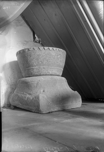 Dopfunt. Fot av sandsten, cuppa av täljsten. 1200-talet. Kategori: (04) Dopfuntar Dopfunt. Fot av sandsten, cuppa av täljsten. 1200-talet.